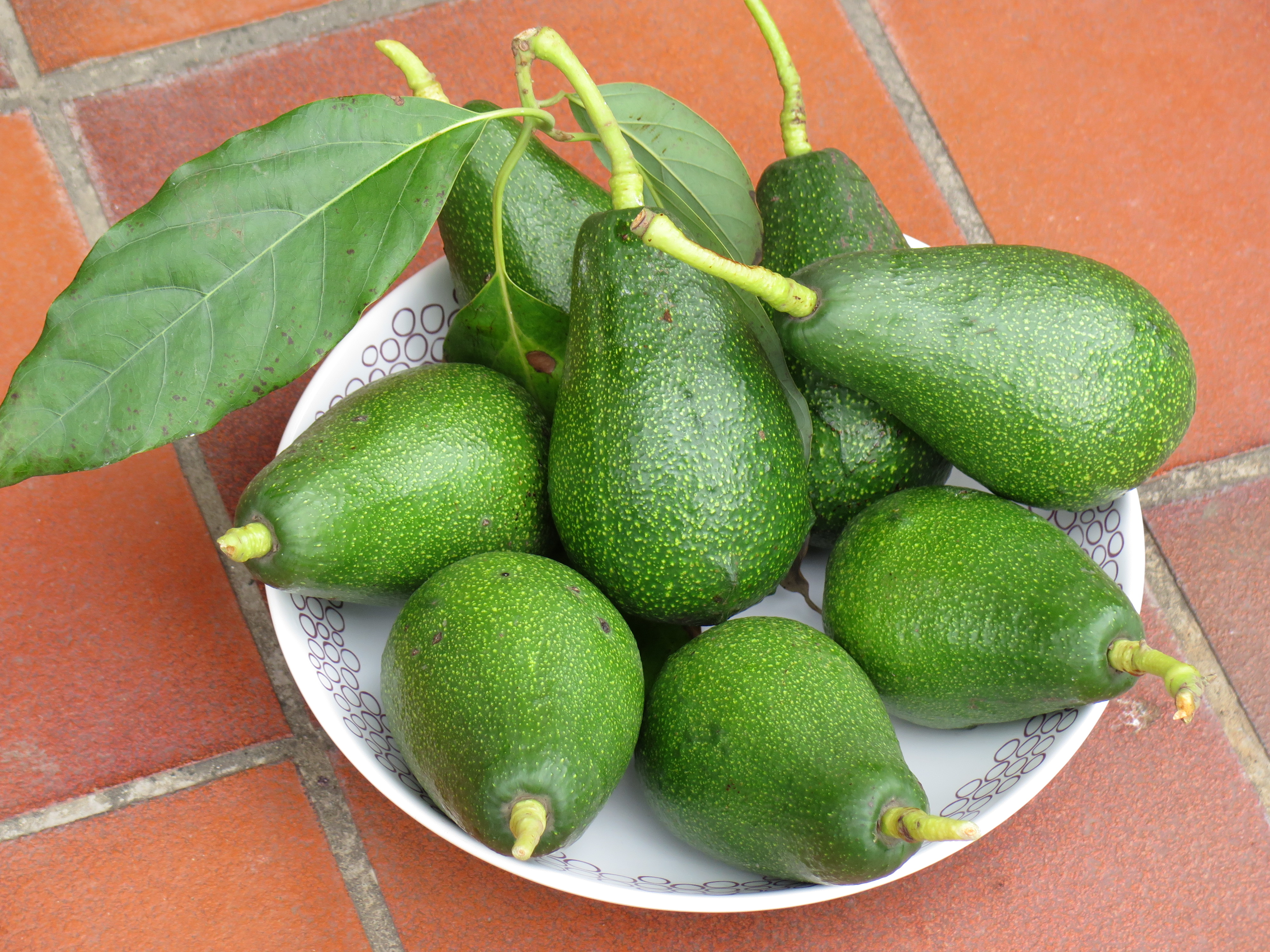 Un piatto di avocado raccolti a Roma